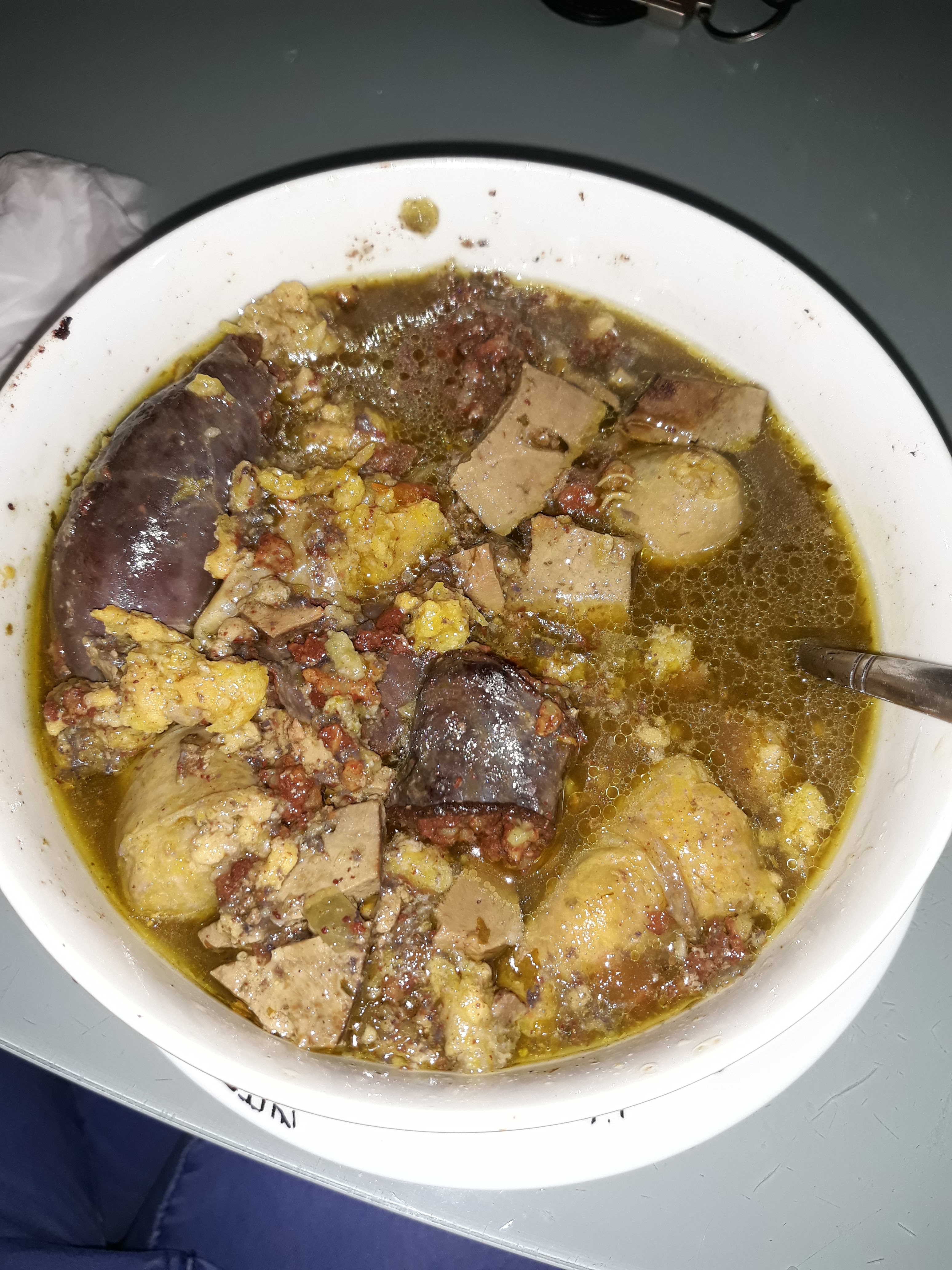 Caldo de manguera o caldo de salchicha